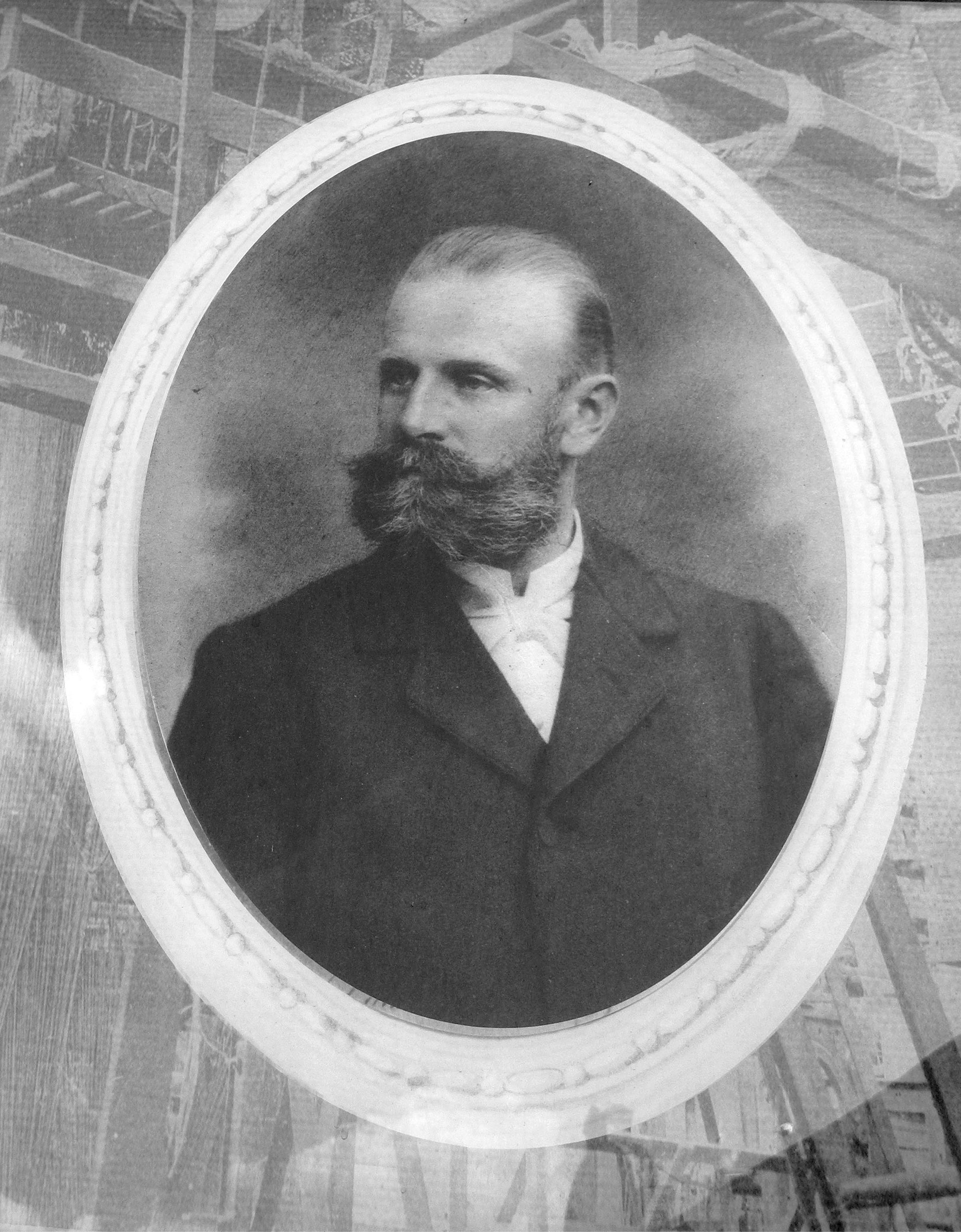 Karl Dittrich jr. (1853–1918), Besitzer der Textilfirmen Hielle & Dittrich in Schönlinde und Żyrardów